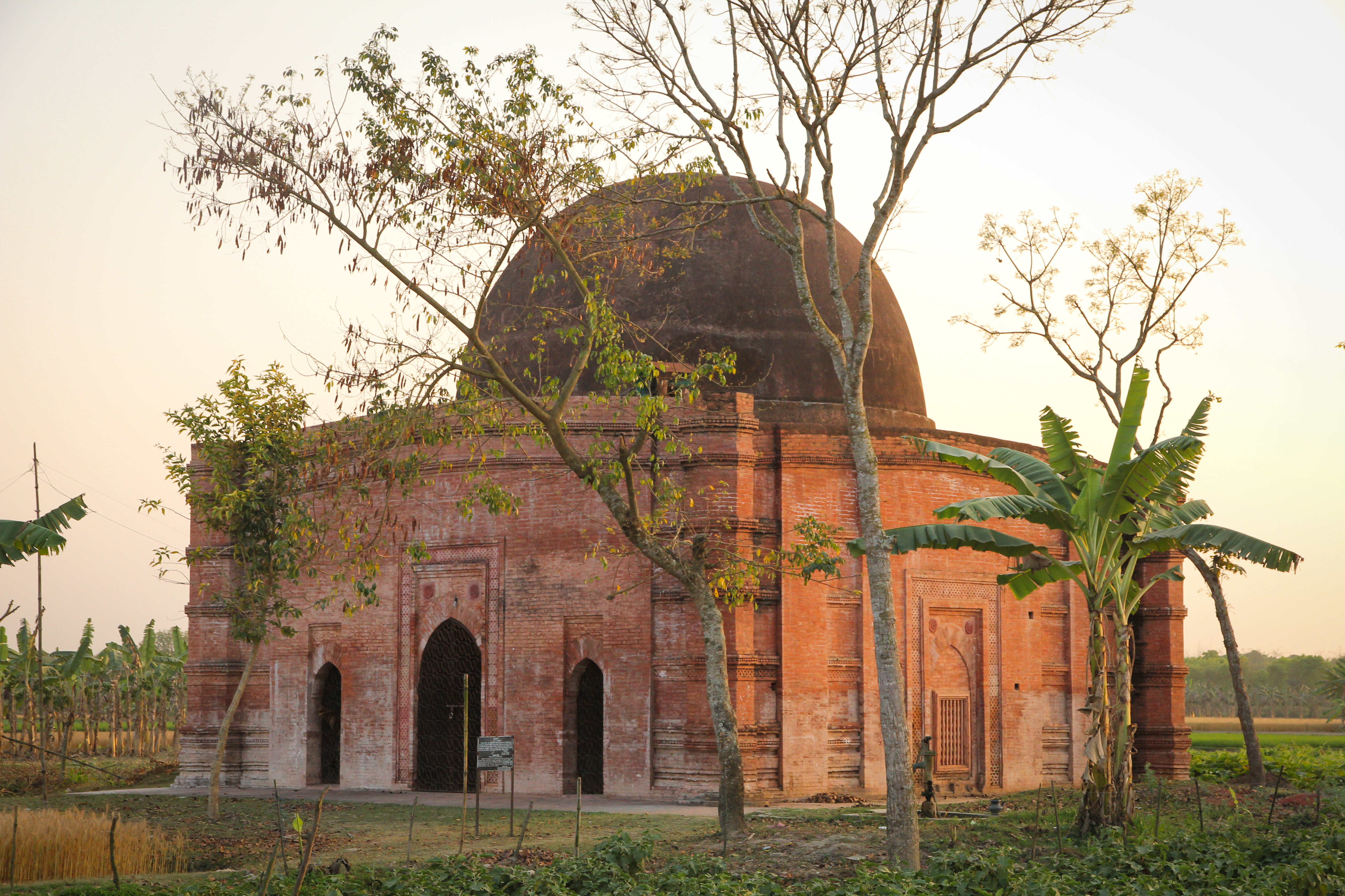 নুনগোলা ঢিবি মসজিদ